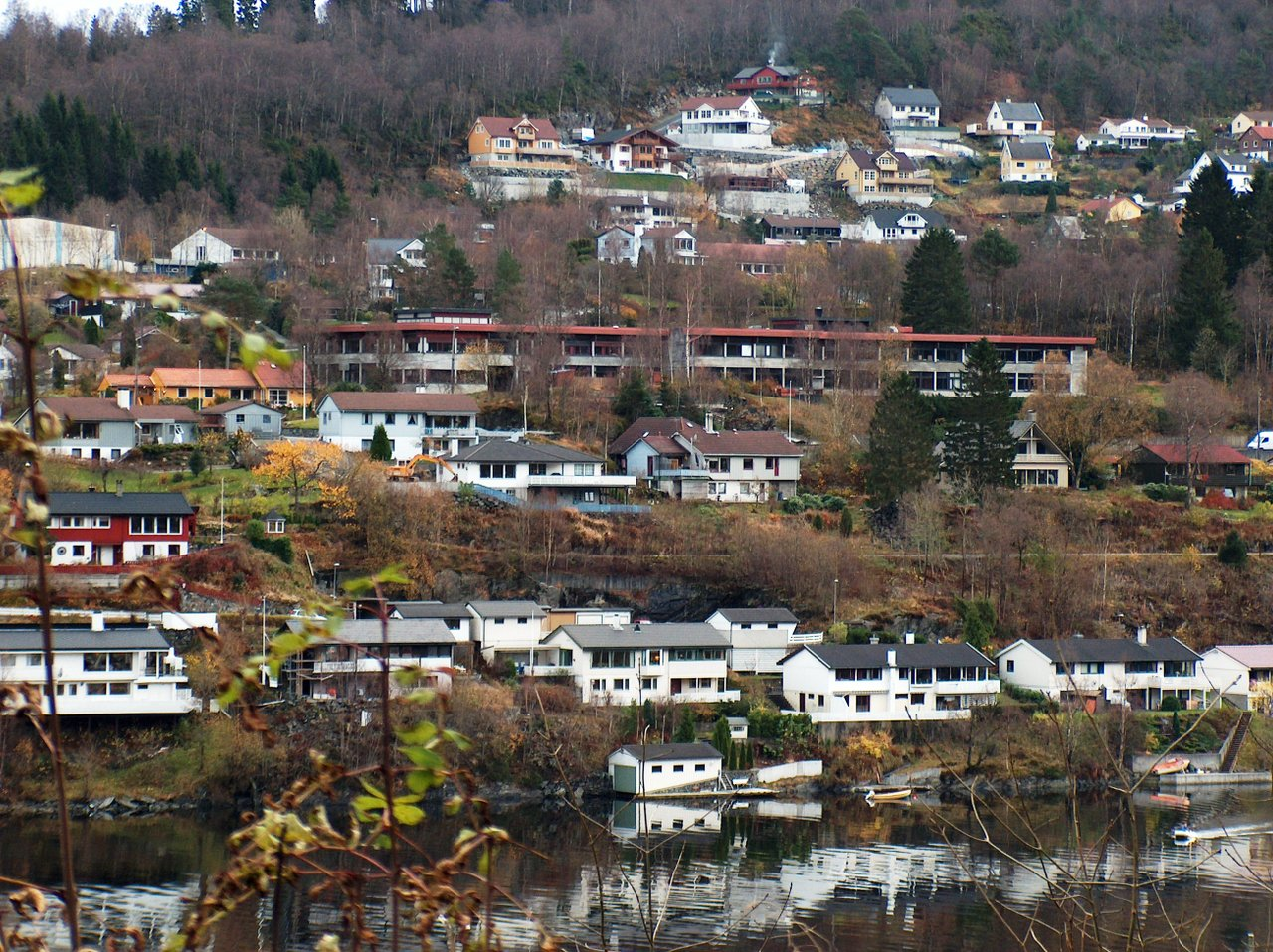 Garnes